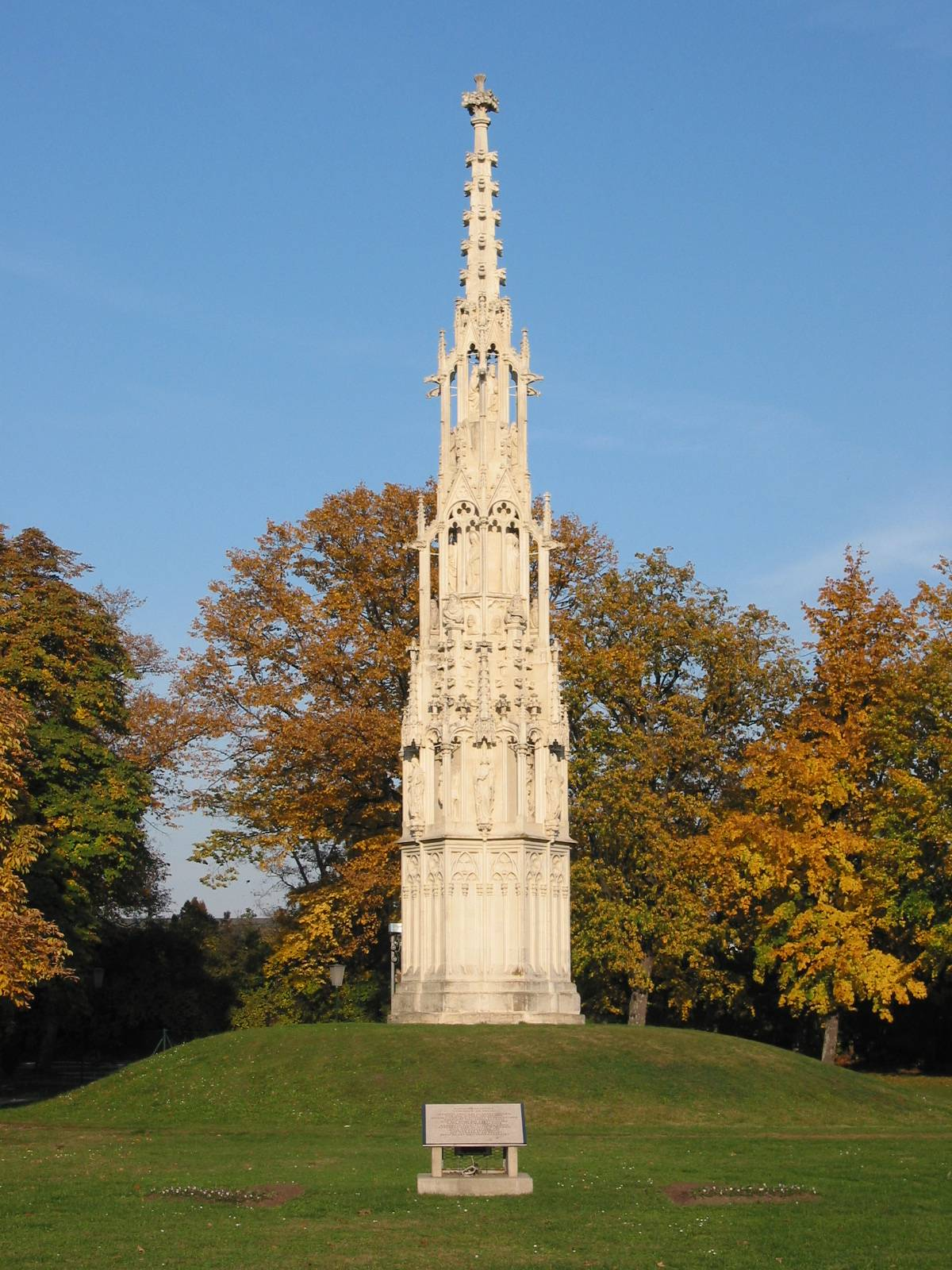 Spinnerin am Kreuz, Wiener Neustadt, 2005-10-27 selfmade photo